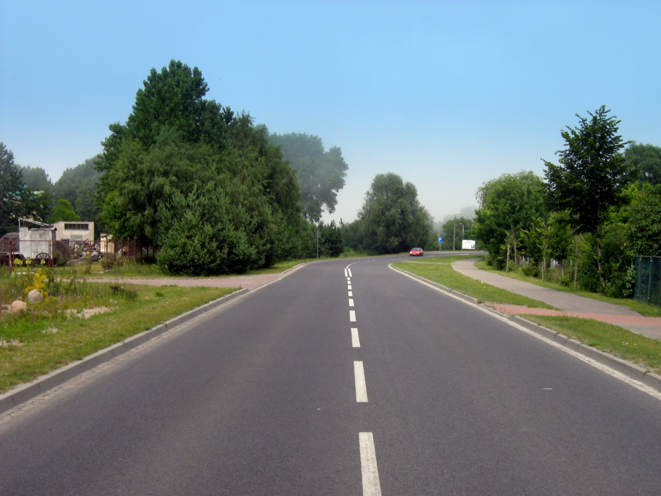 Droga wojewódzka nr 102 w Międzyzdrojach.